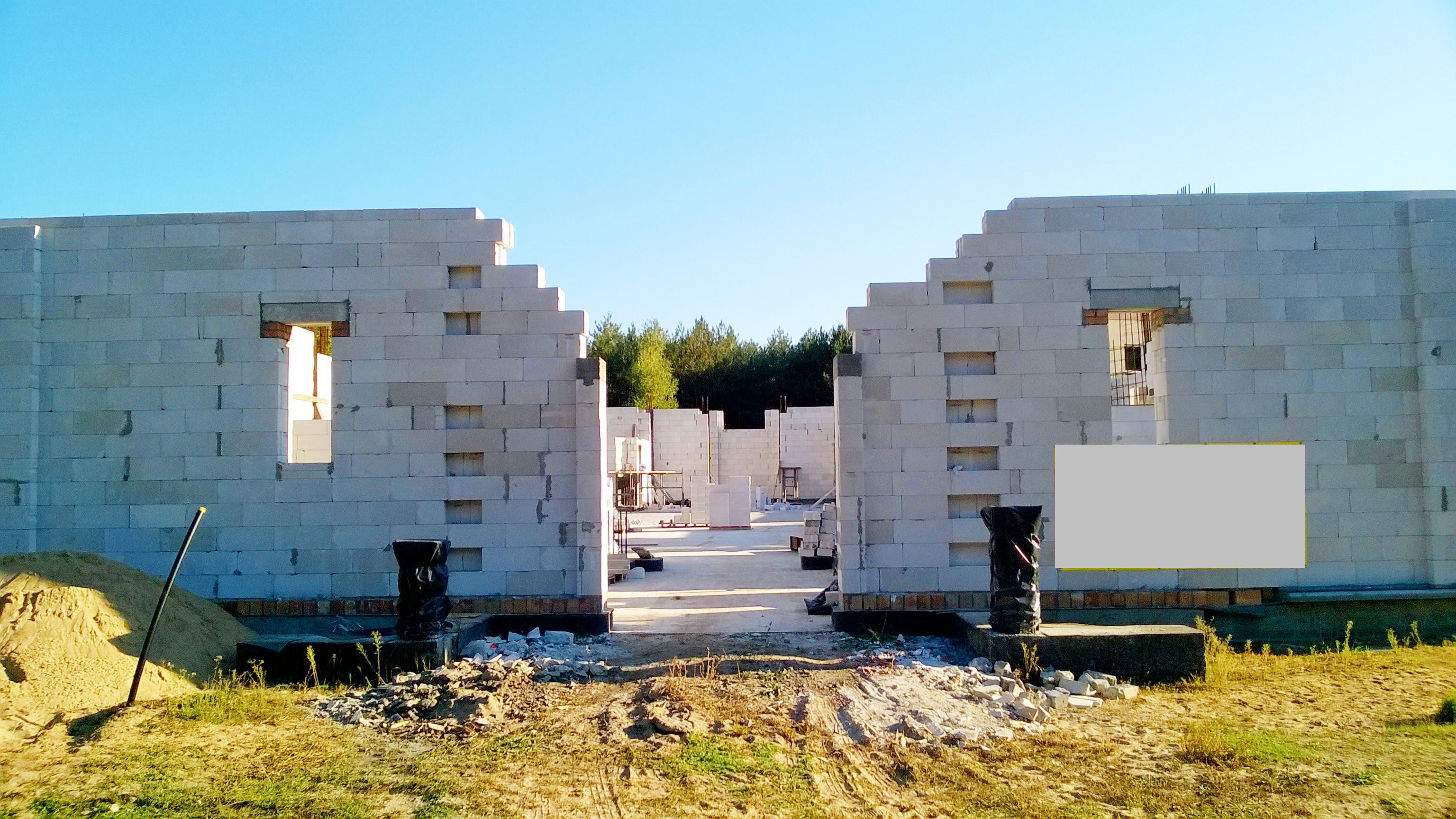 Budowa kościoła błogosławionej Matki Marii Karłowskiej w Toruniu